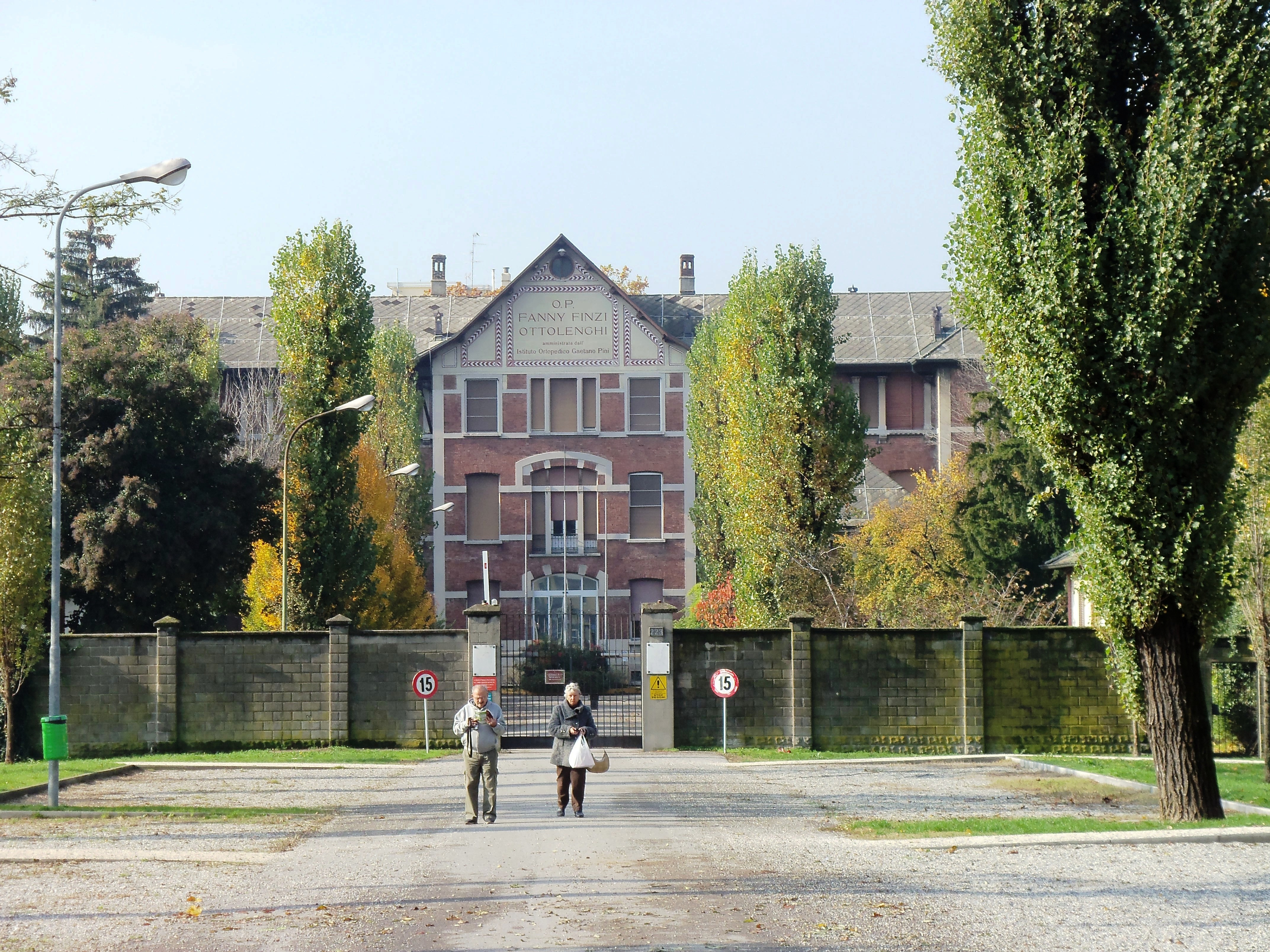 Milano, nel parco di Villa Finzi, il vecchio "ricovero dei Rachitici" per il recupero degli handicap motori